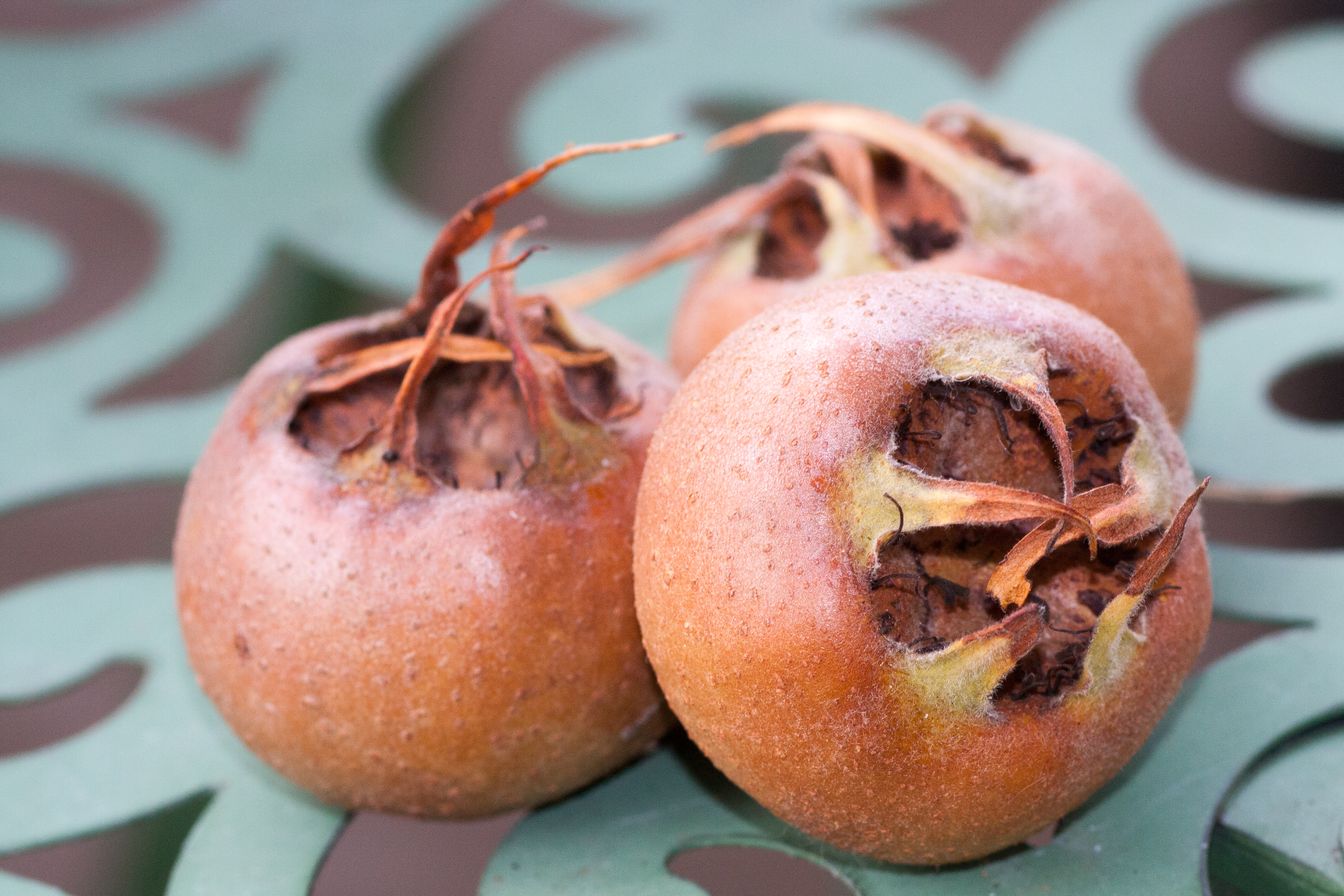 Nahaufnahme von drei Mispel. Sie stammen aus Heidelberg-Handschuhsheim im Jahr 2013.